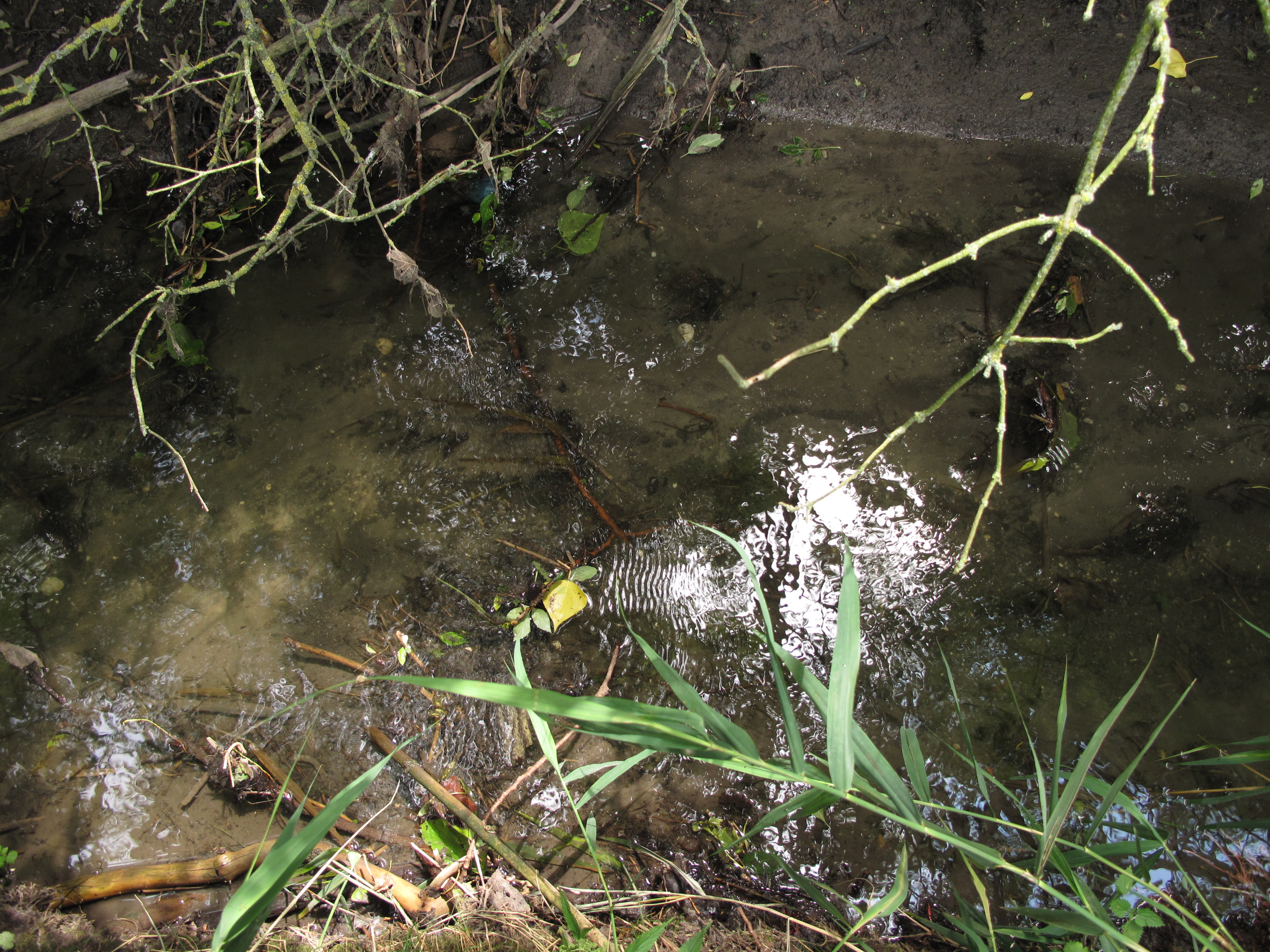 Štítarský potok. Česká republika.